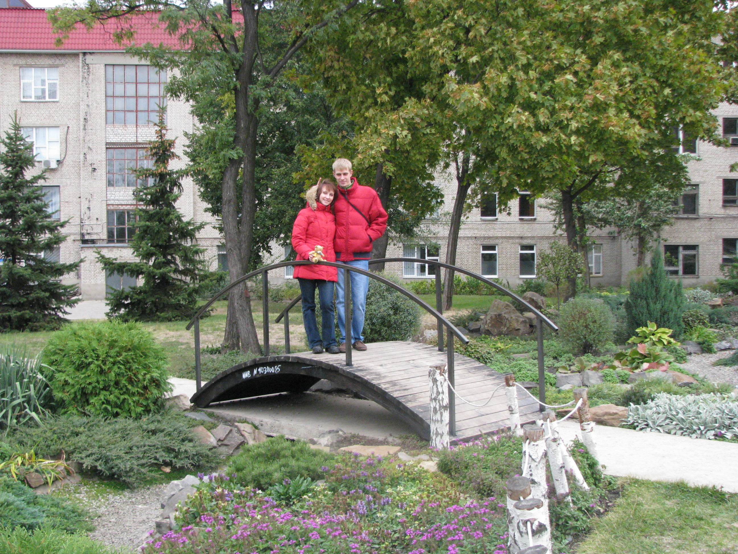 атракційні місця капусу ЛНУ ім. Т. Шевченка: "японський місток" та альпійська гірка на території кампусу ЛНУ - місце, що завжди приваблює туристів